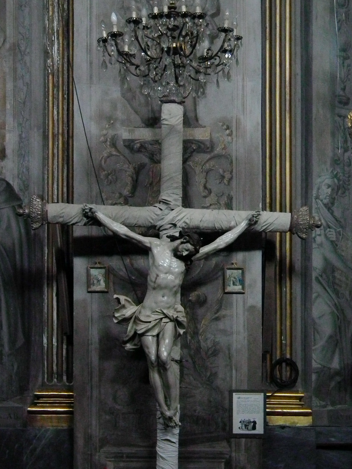 Oratorio di Sant'Antonio Abate Native nameOratorio di Sant'Antonio AbateLocationGenoa, Liguria, ItalyCoordinates44° 24′ 13.68″ N, 8° 55′ 54.26″ E Authority control : Q3884793 institution QS:P195,Q3884793